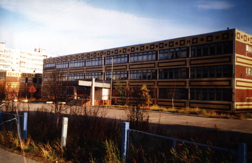 Мурманск. Школа №31 Осень